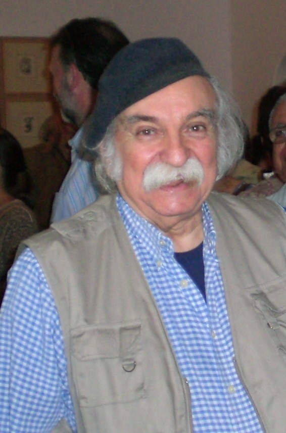 Venezuelan writer Manuel Caballero